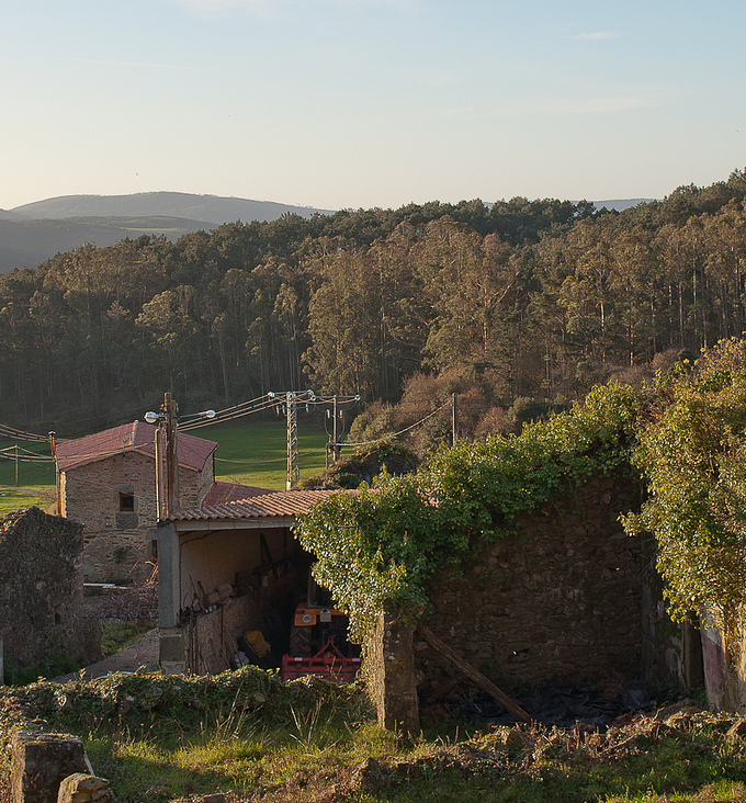 Queiroso